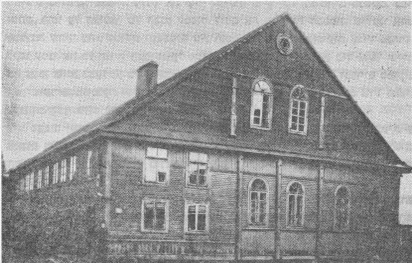 Synagoga zbudowana w drugiej połowie XIX w. w pobliżu Rynku (obecnie część parkingu przy dworcu PKS). Zburzona przez Niemców w 1943 r. Fotografia z końca lat 20-tych.